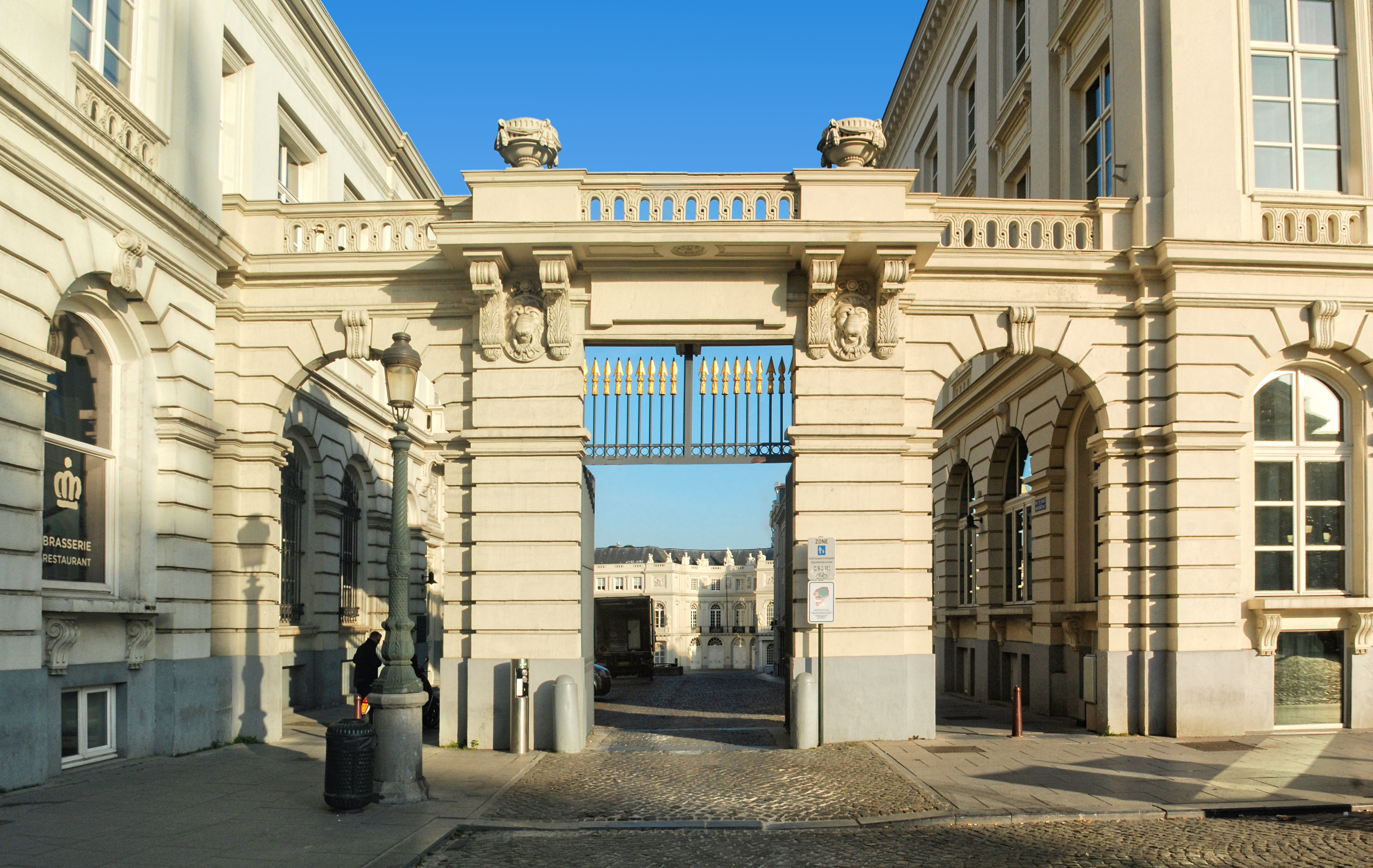 Belgique - Bruxelles - Place Royale - Portique de la rue du Musée